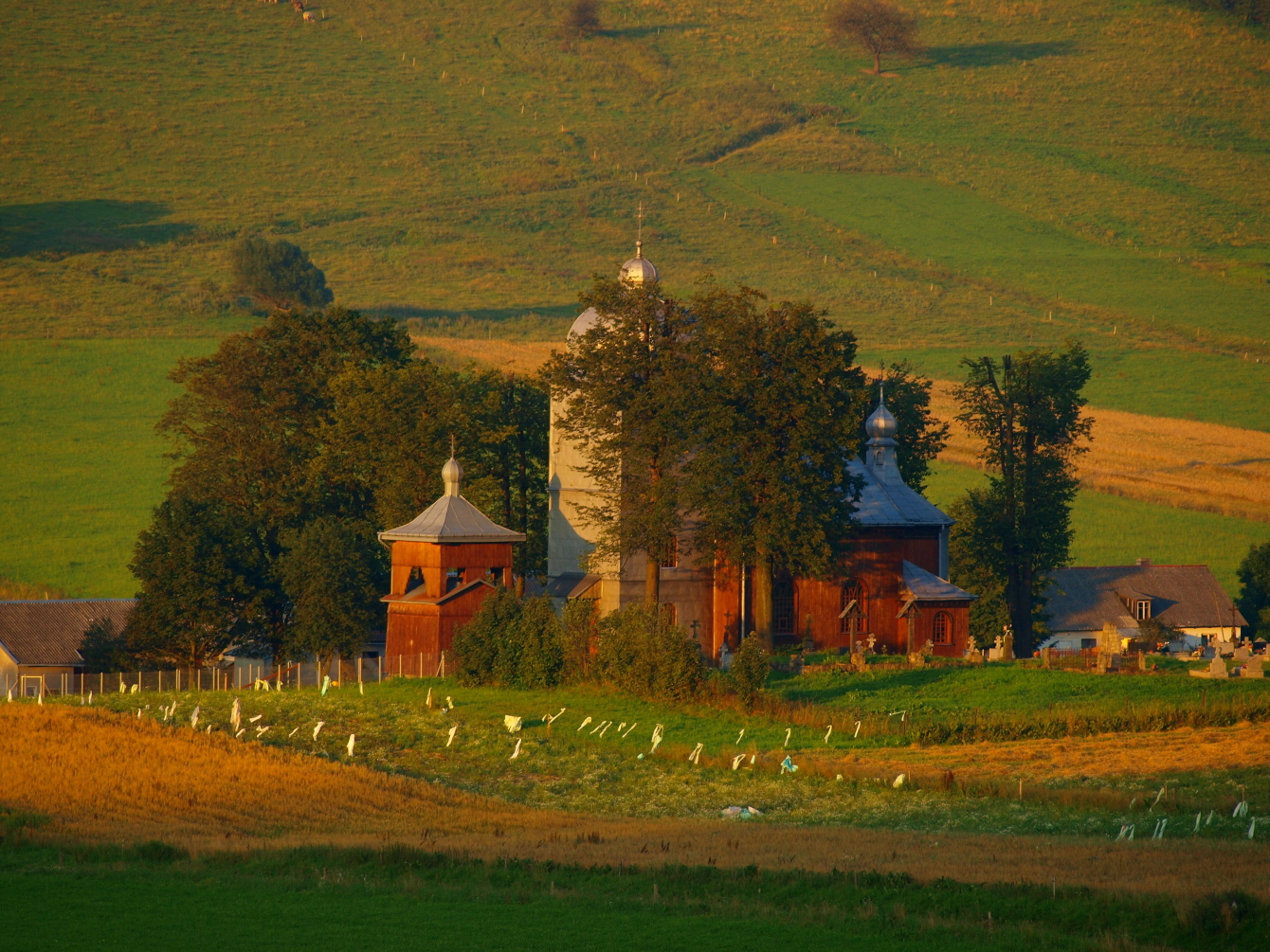 cerkiew greko-kat., ob. prawosławna p.w. św. Wasyla Wielkiego, drewn., 1911